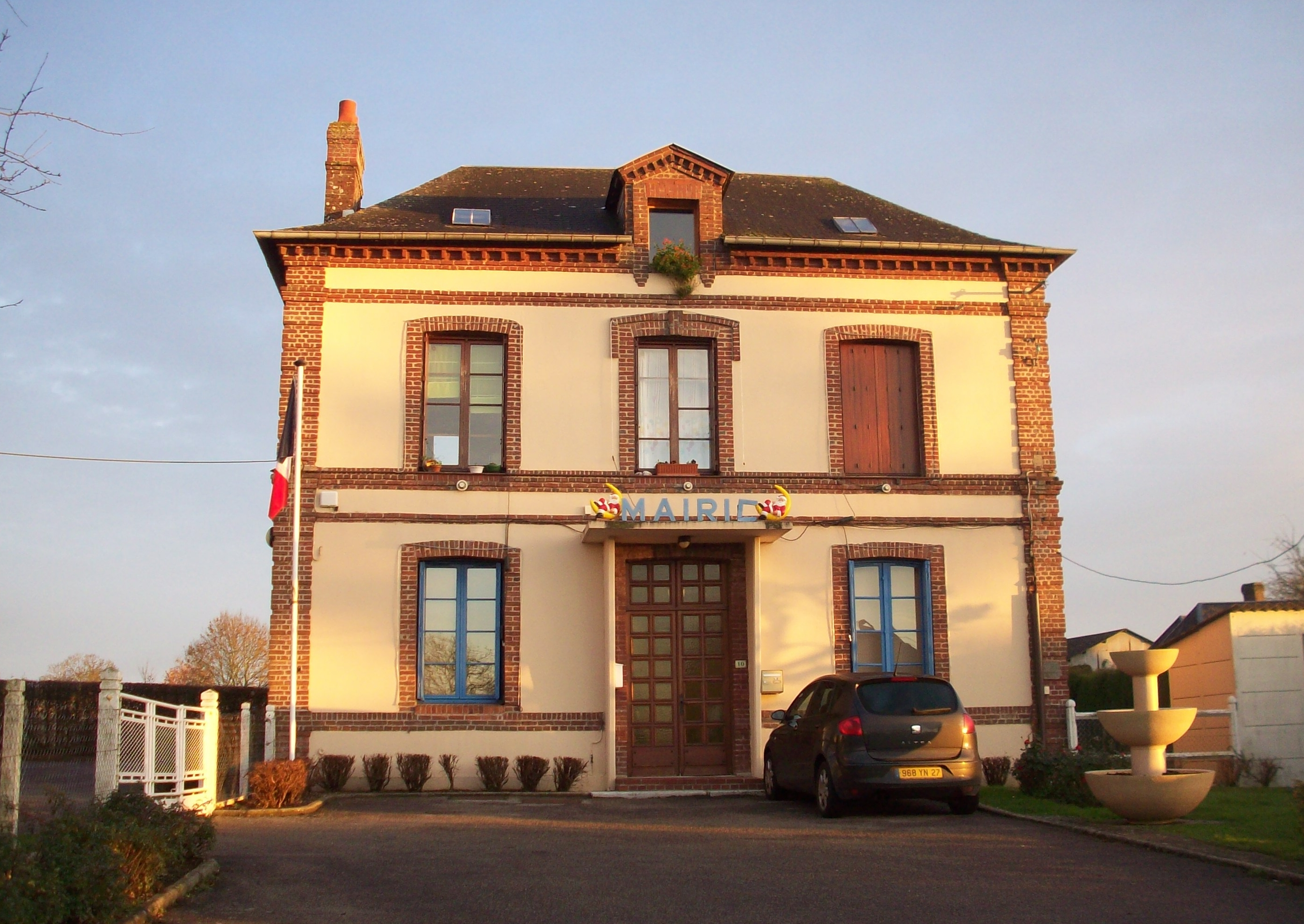 Mairie de Brestot.